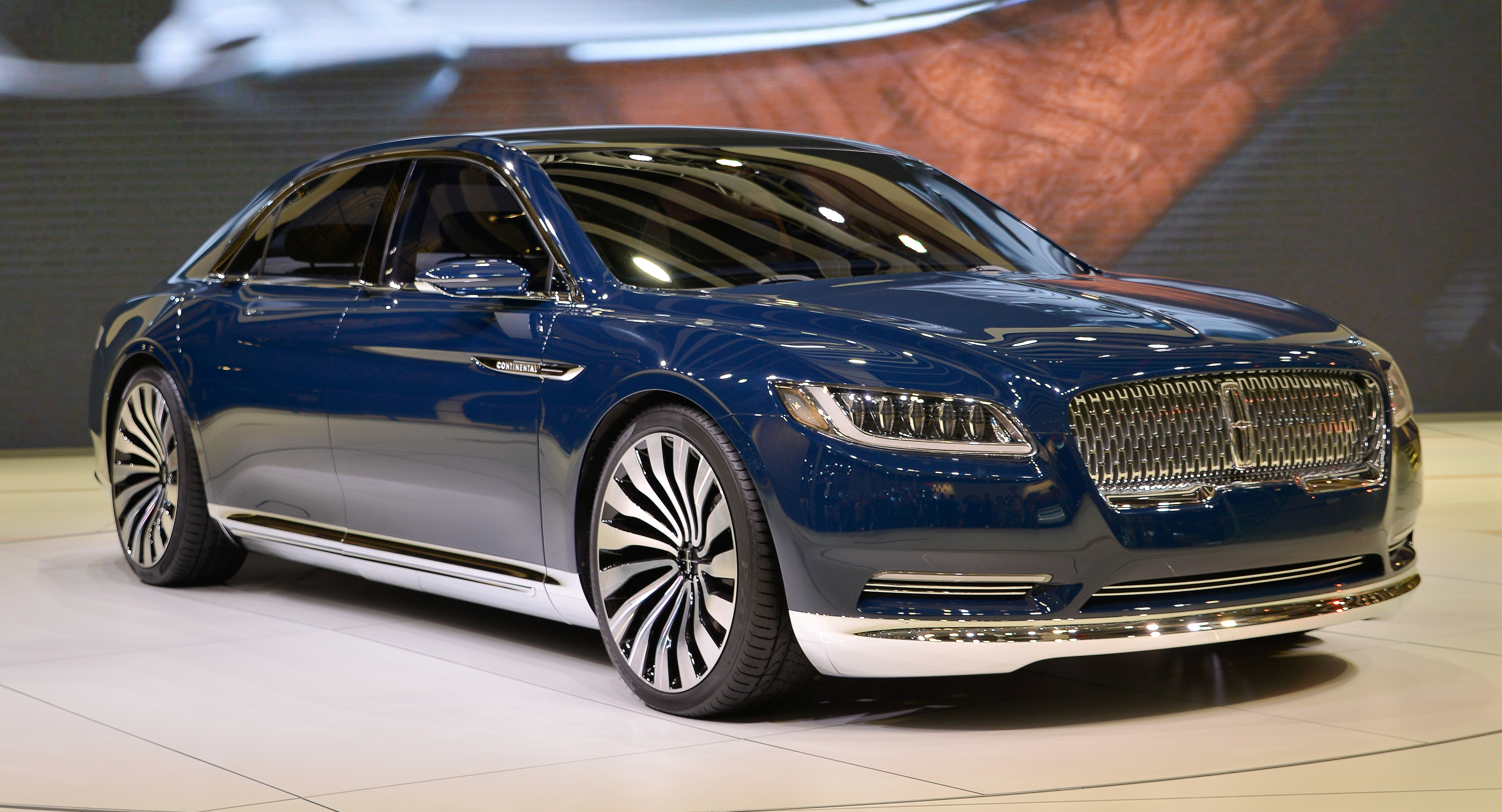 Lincoln continental 2015 Auto Shanghai 2015